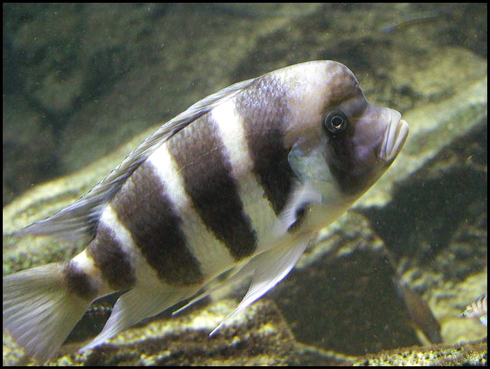 Cyphotilapia frontosa